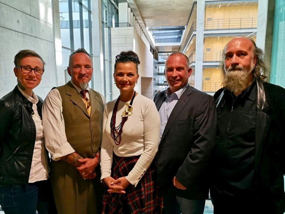 Der D.O.T. Vorstand im deutschen Bundestag mit Gitta Connemann (MdB) und Herry Nentwig (U.E.T.A) September 2018